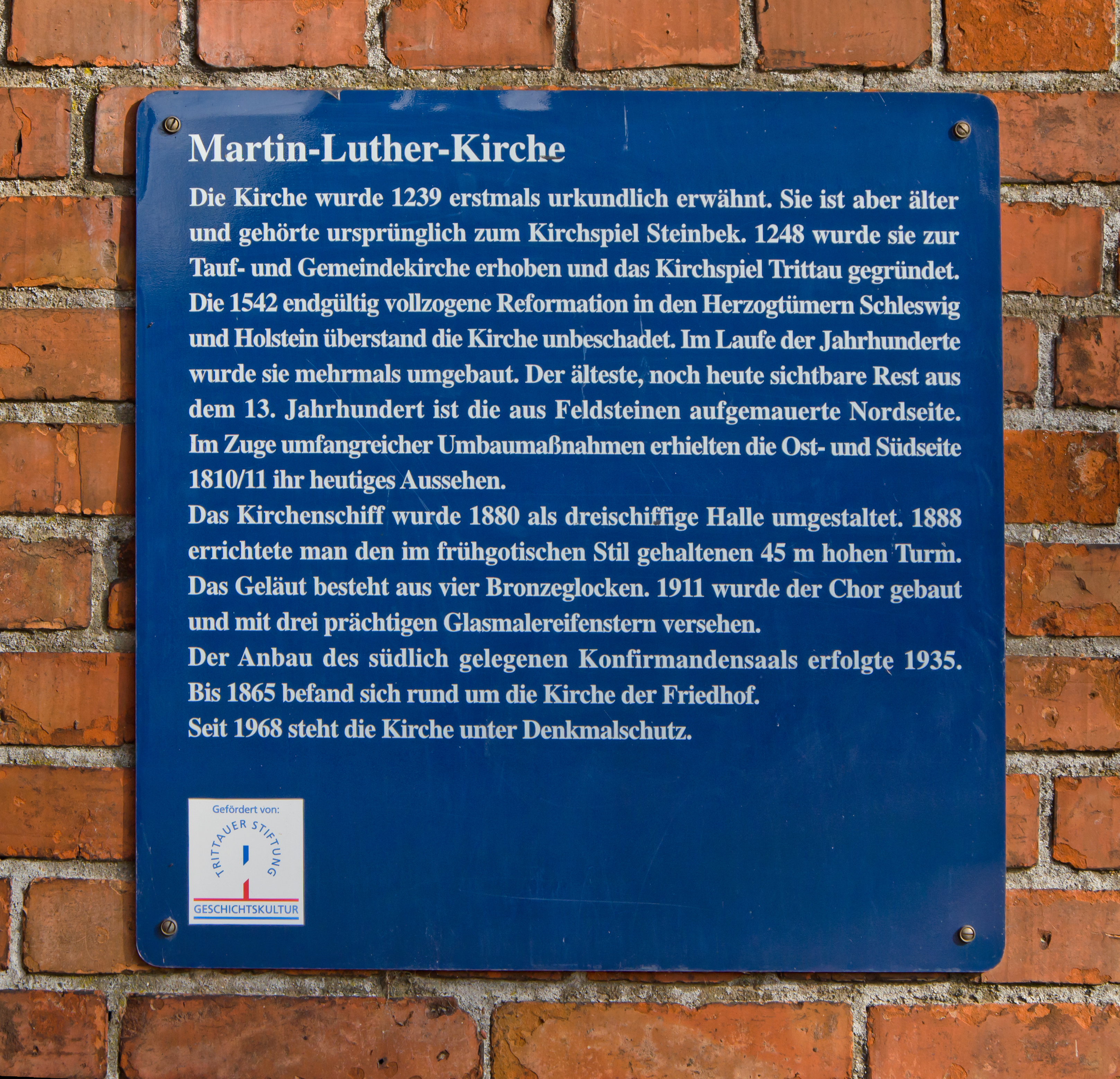 Trittau Martin-Luther-Kirche blaue Tafel